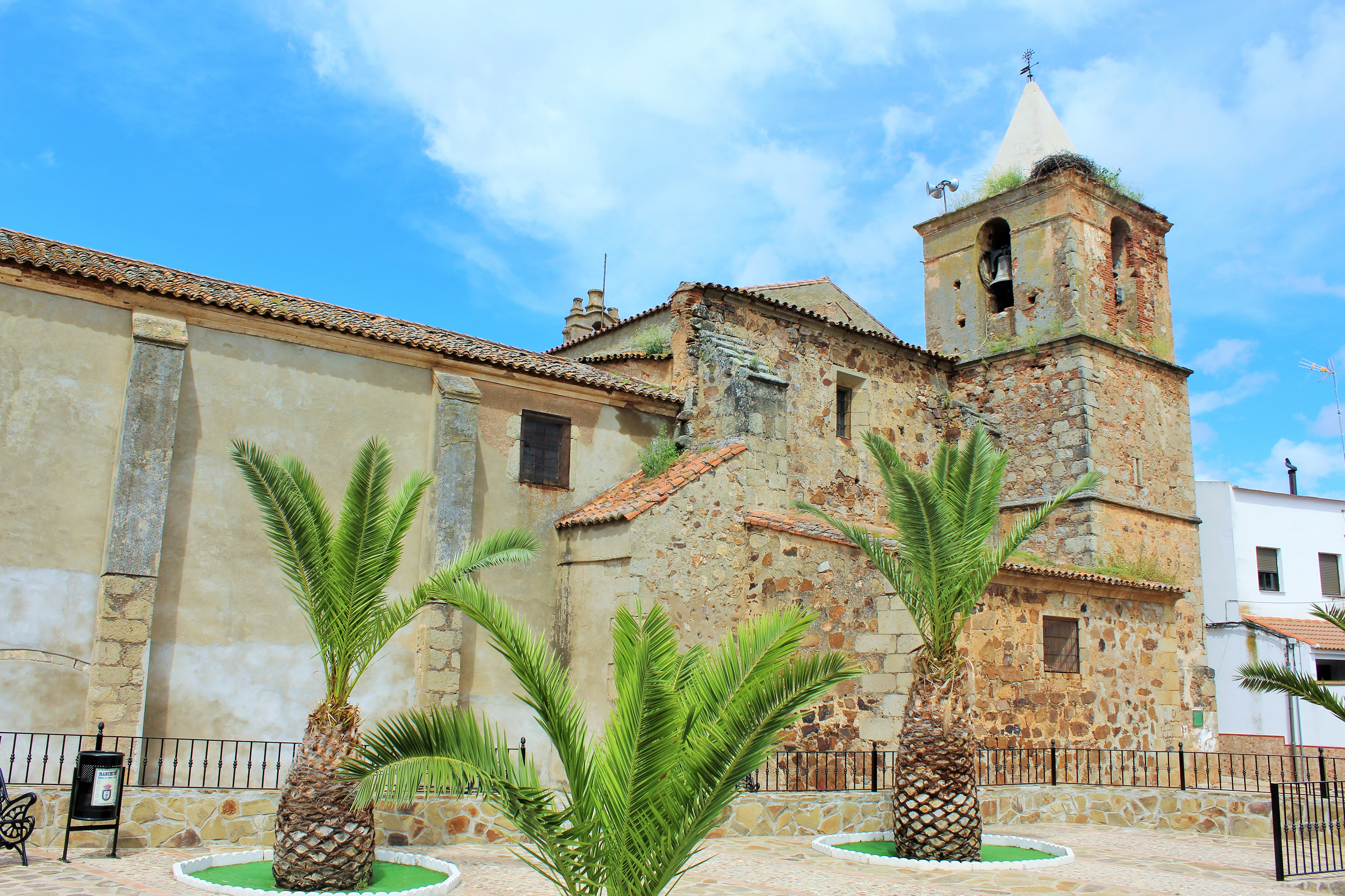 Fachada sur de la iglesia parroquial